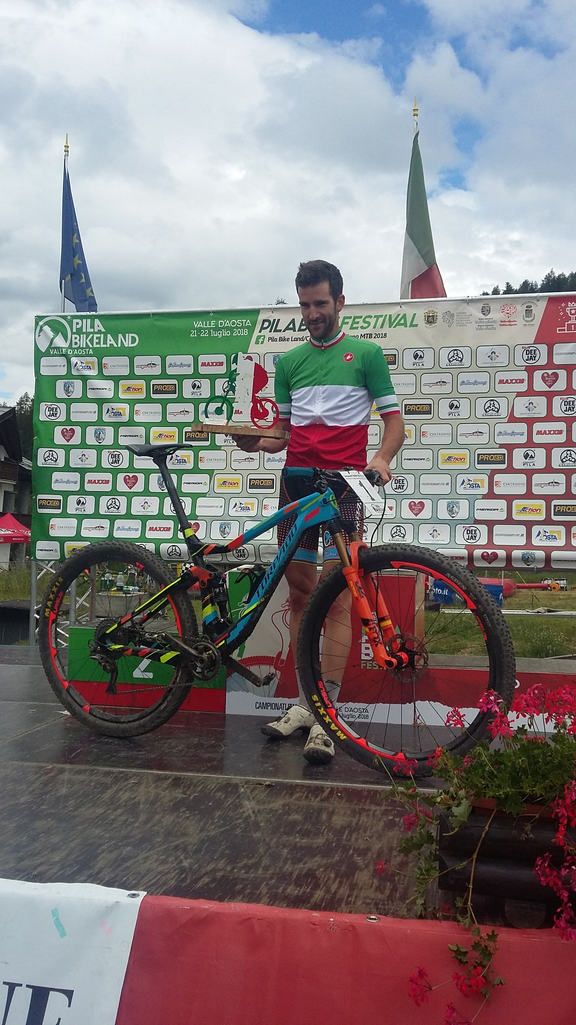 Italienmeister 2018 in Pila, Aostatal, Italien.